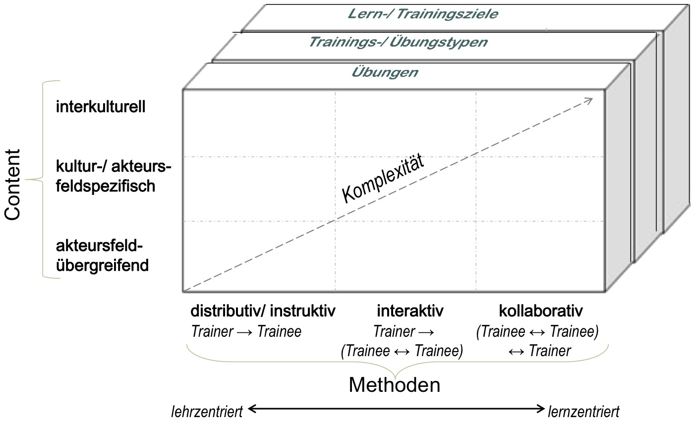 Maßnahmen zur interkulturellen Personalentwicklung